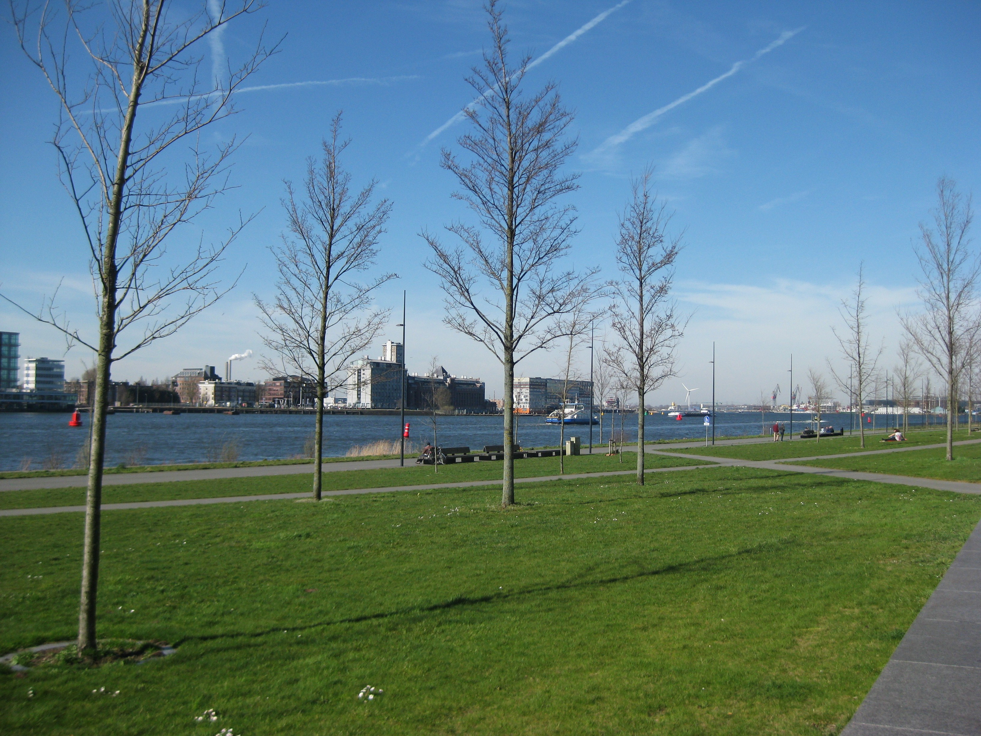 Oeverpark in Amsterdam-Noord